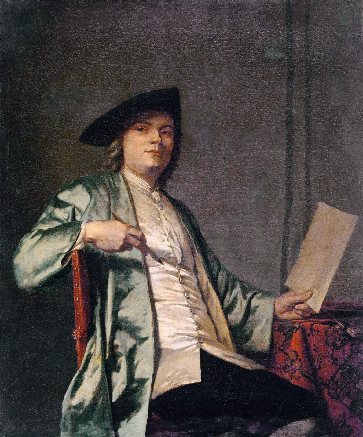 Portrait of Cornelis Ploos van Amstel. Pendant of File:George van der Mijn 001.jpg.